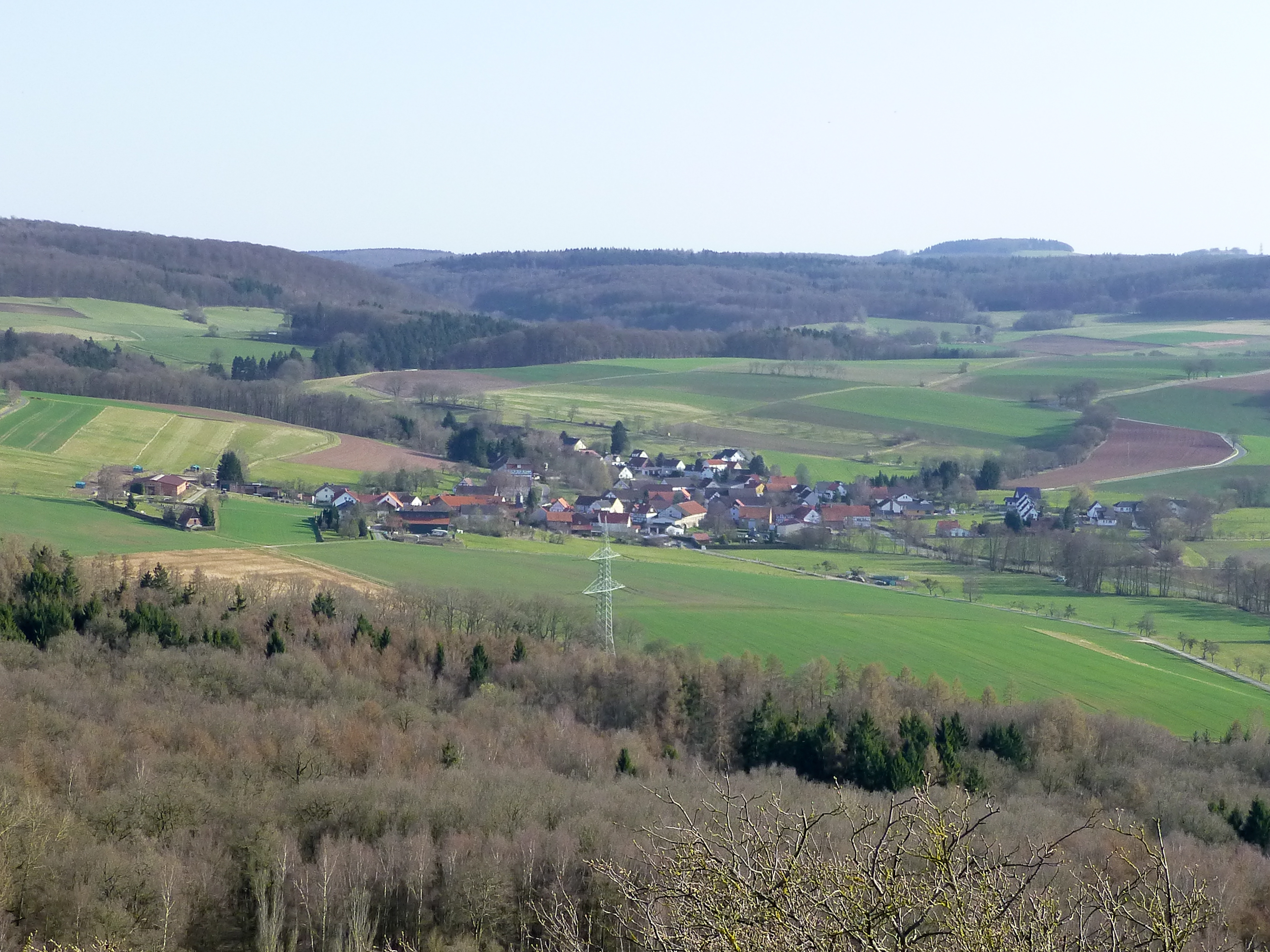 Allmuthshausen vom Aussichtsturm Streuflingskopf gesehen